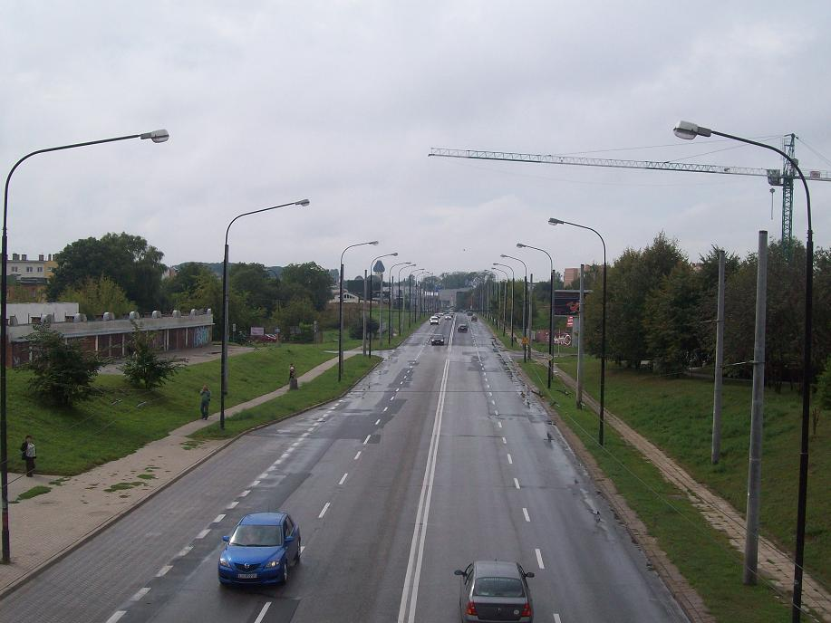 Widok na ulicę W. Orkana w Lubline z kładki dla pieszych